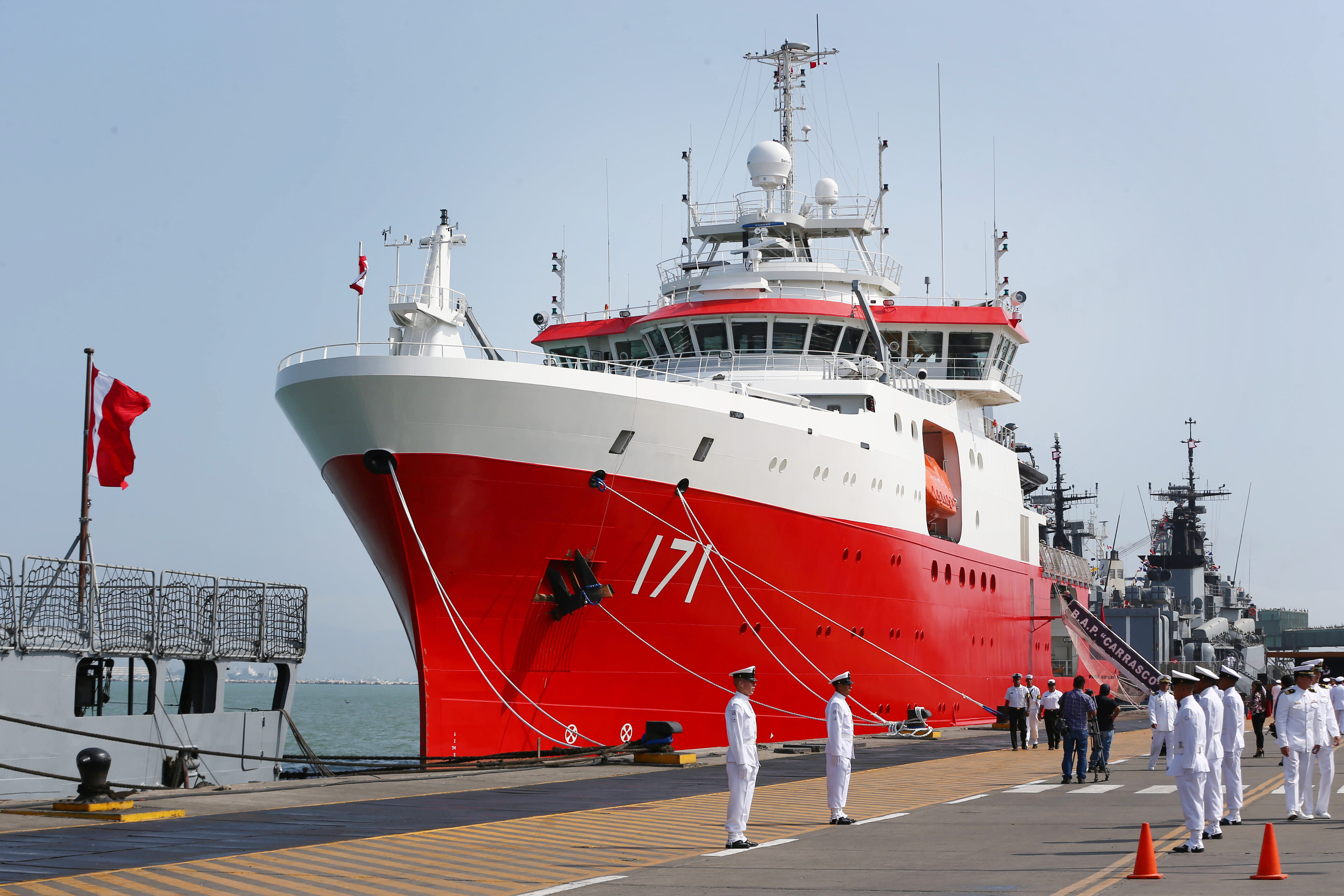 BAP Carrasco en Base Naval del Callao